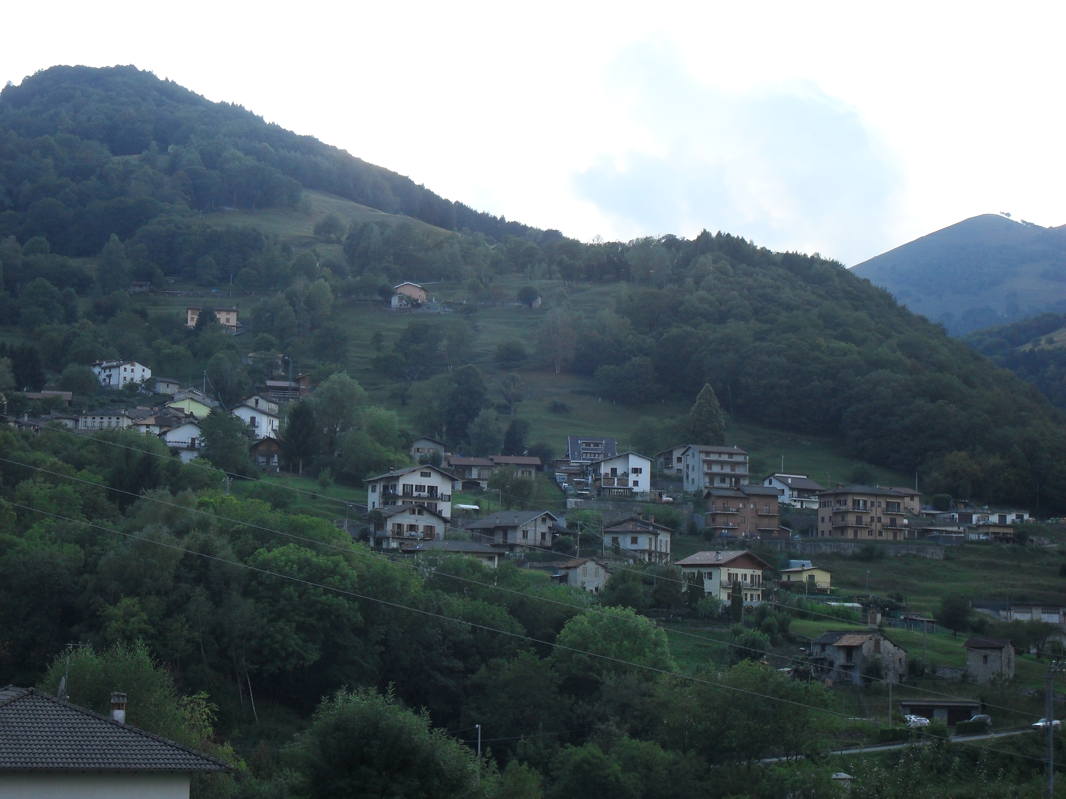 Frazione di Schignano